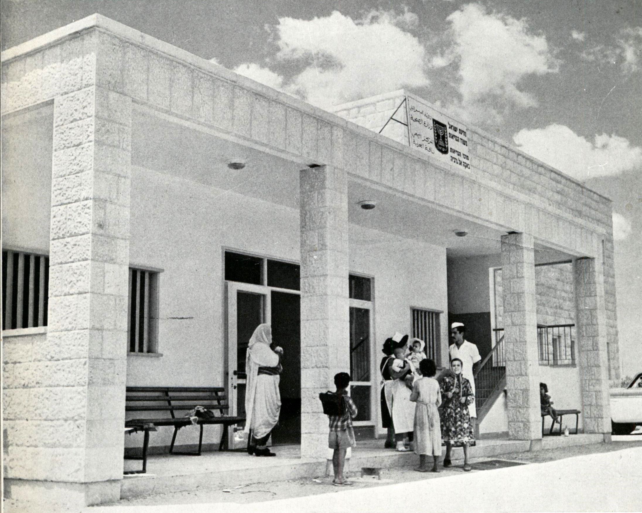 מרכז הבריאות באקה-אל-גרביה. מרכז זה והמרכז בטירה משמשים את כפרי המשולש - 1956-1957